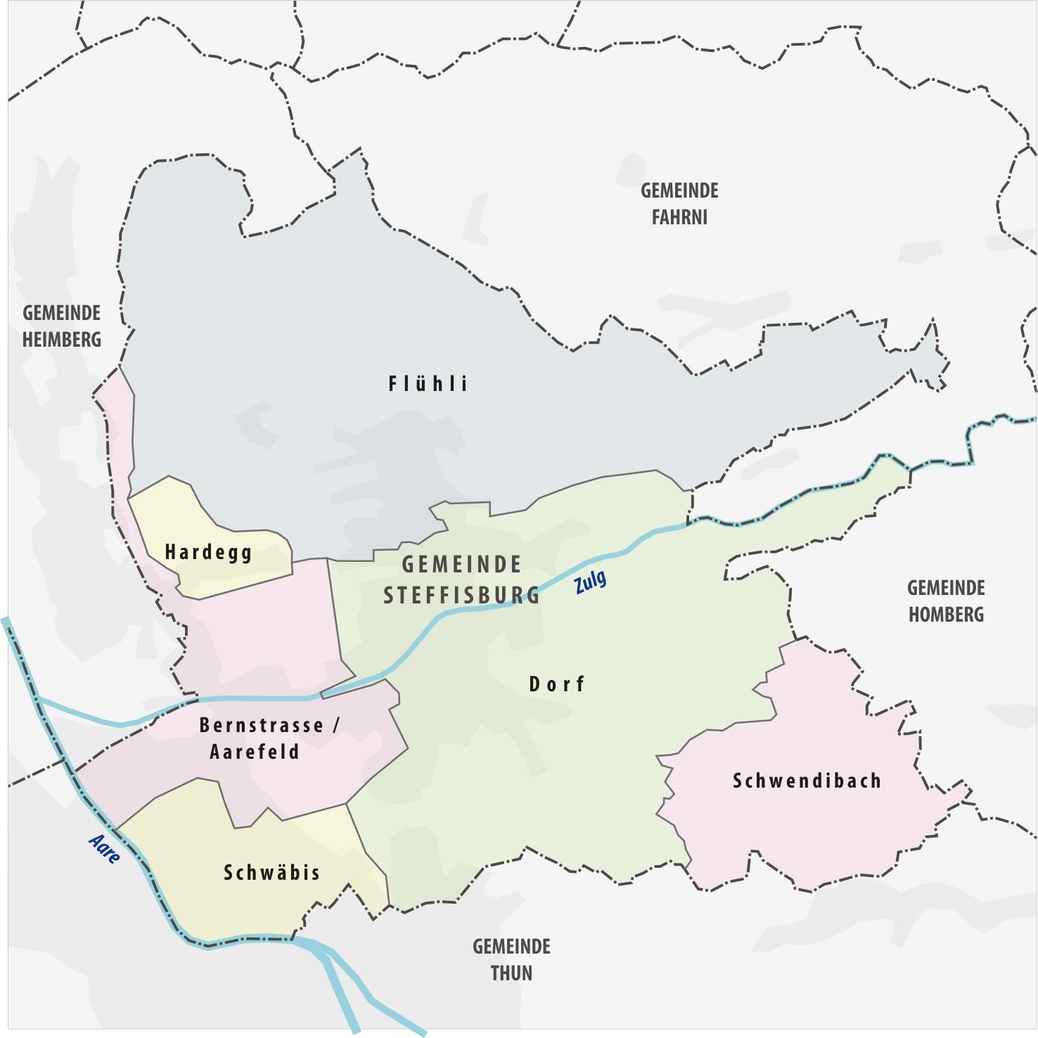 Quartiere der Gemeinde Steffisburg